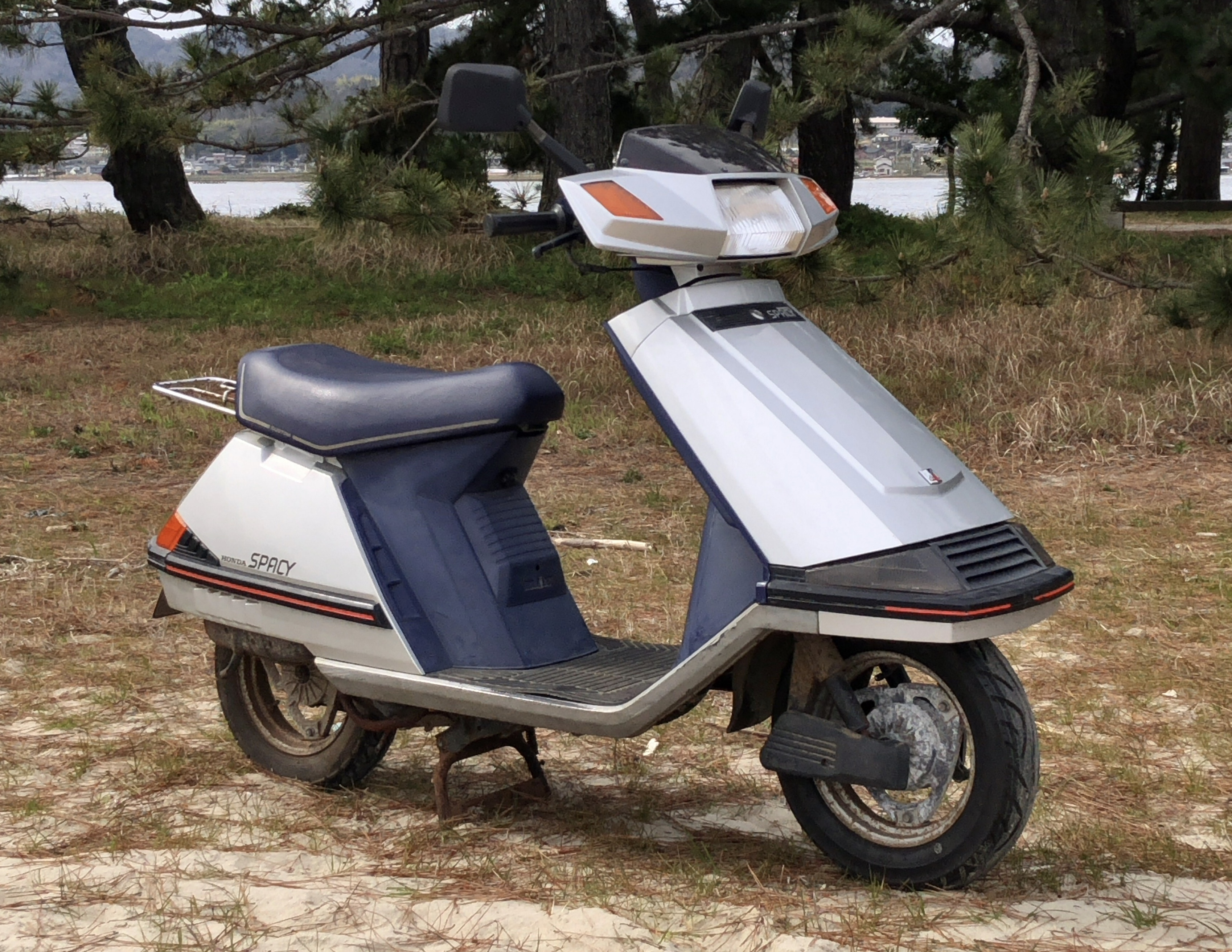 後期型 カスタム